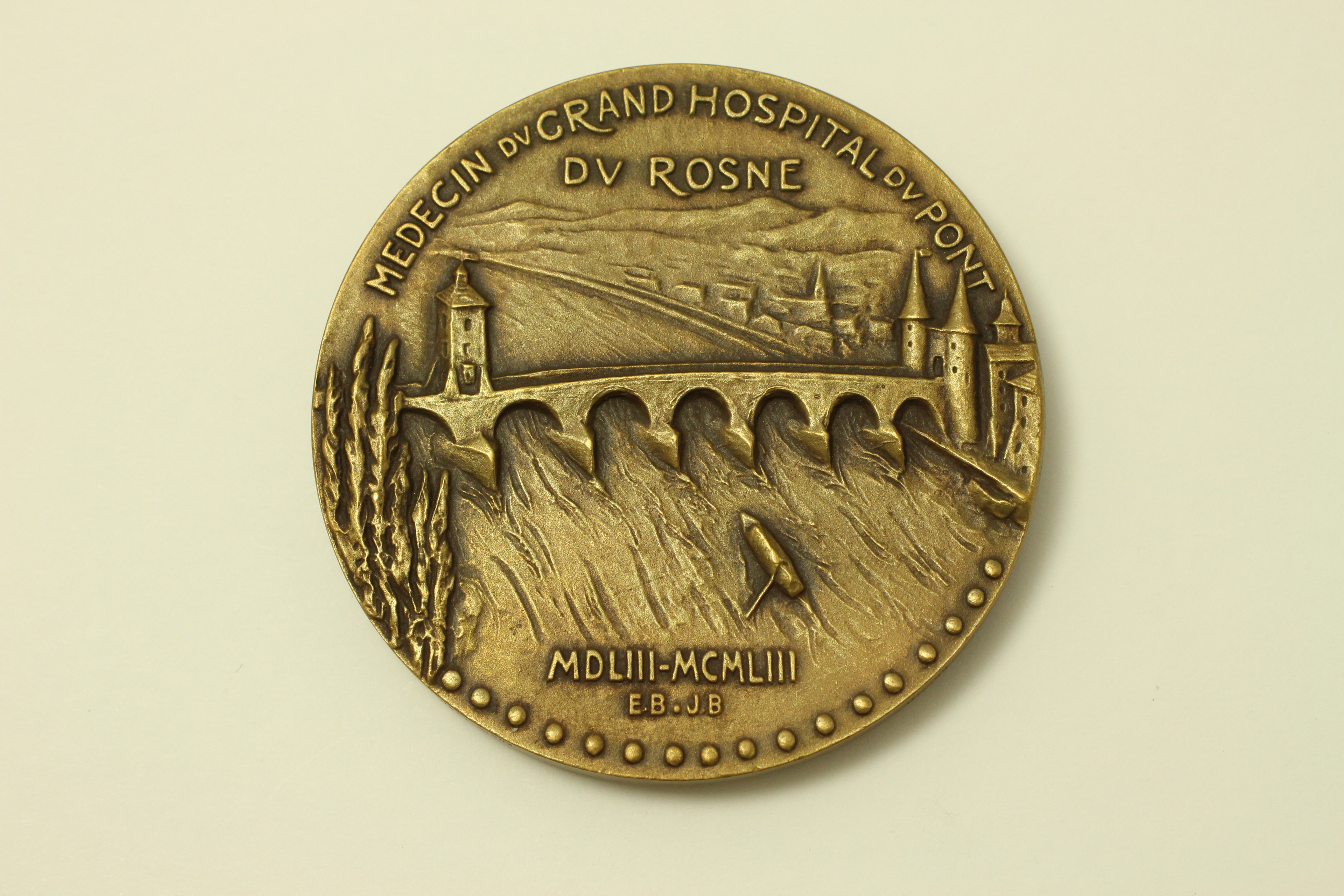 Médaille à l'effigie de François Rabelais ; bronze, 1953 ; revers ; Propriété des Hospices civils de Lyon